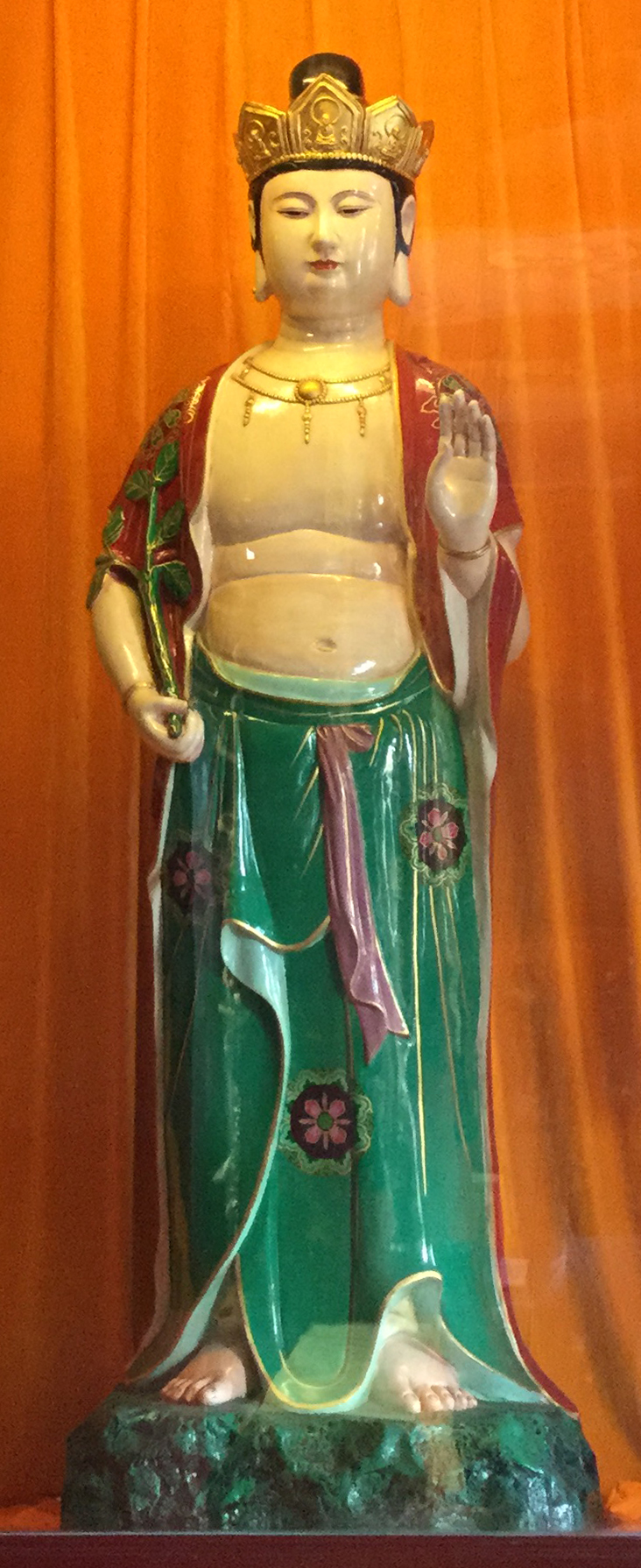 菩提树神，位于汕头天坛花园九天禅院。